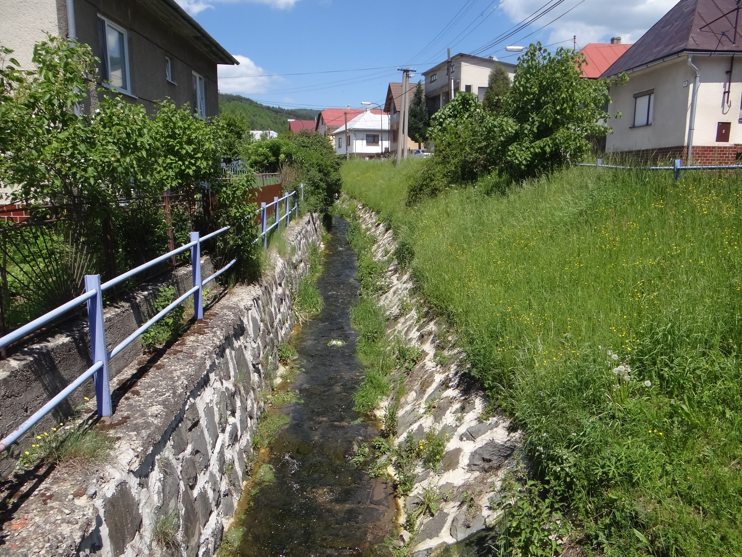 Kyjov